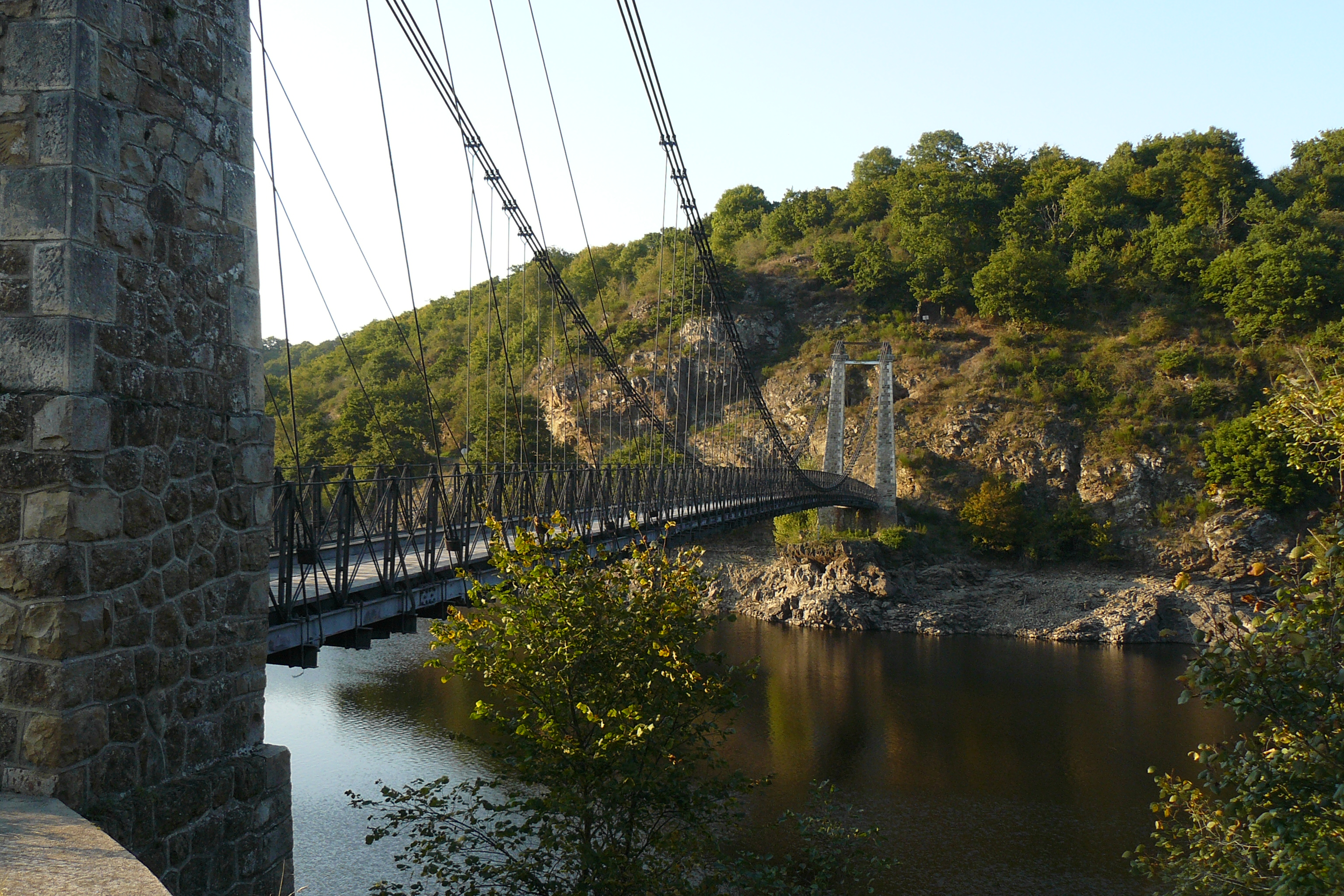 Pont suspendu sur la Tardes, reliant les communes d'Évaux-les-Bains et de Budelière (Creuse, France).